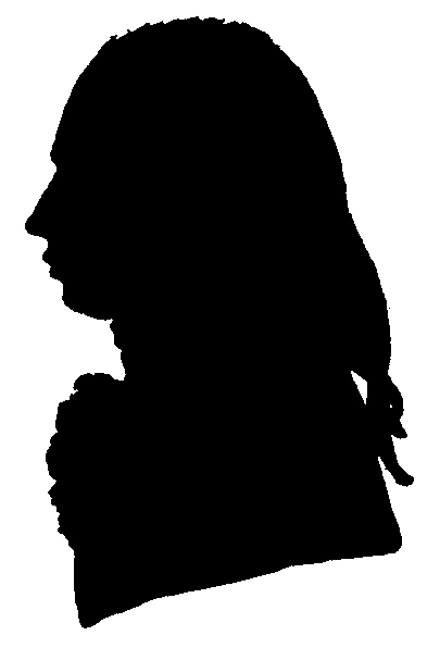 Scherenschnitt Johann Friedrich Haug (1728–1793), deutscher Instrumentenbauer